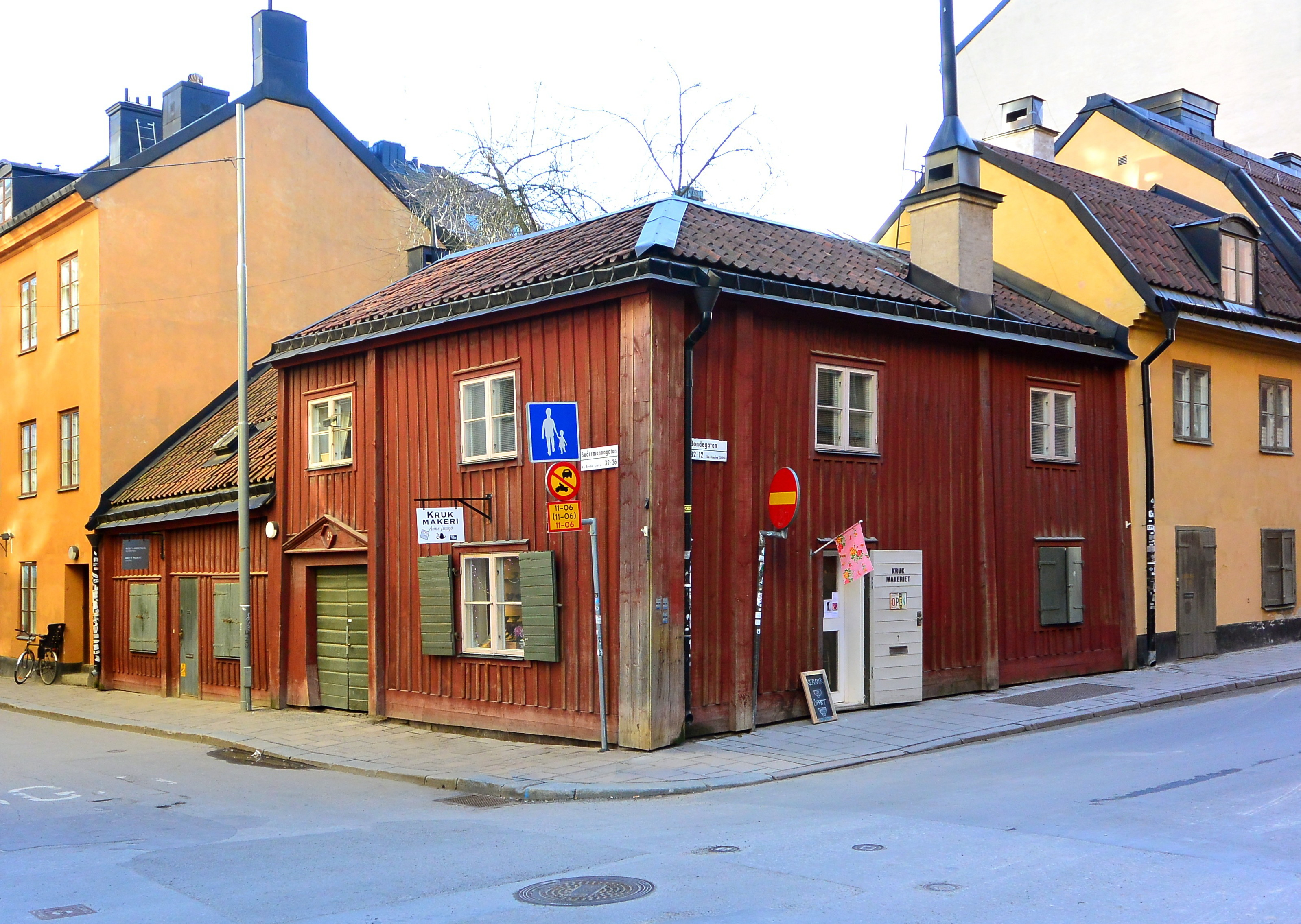 En av Södermalms kvarvarande träkåkar i hörnet Bondegatan–Södermannagatan.